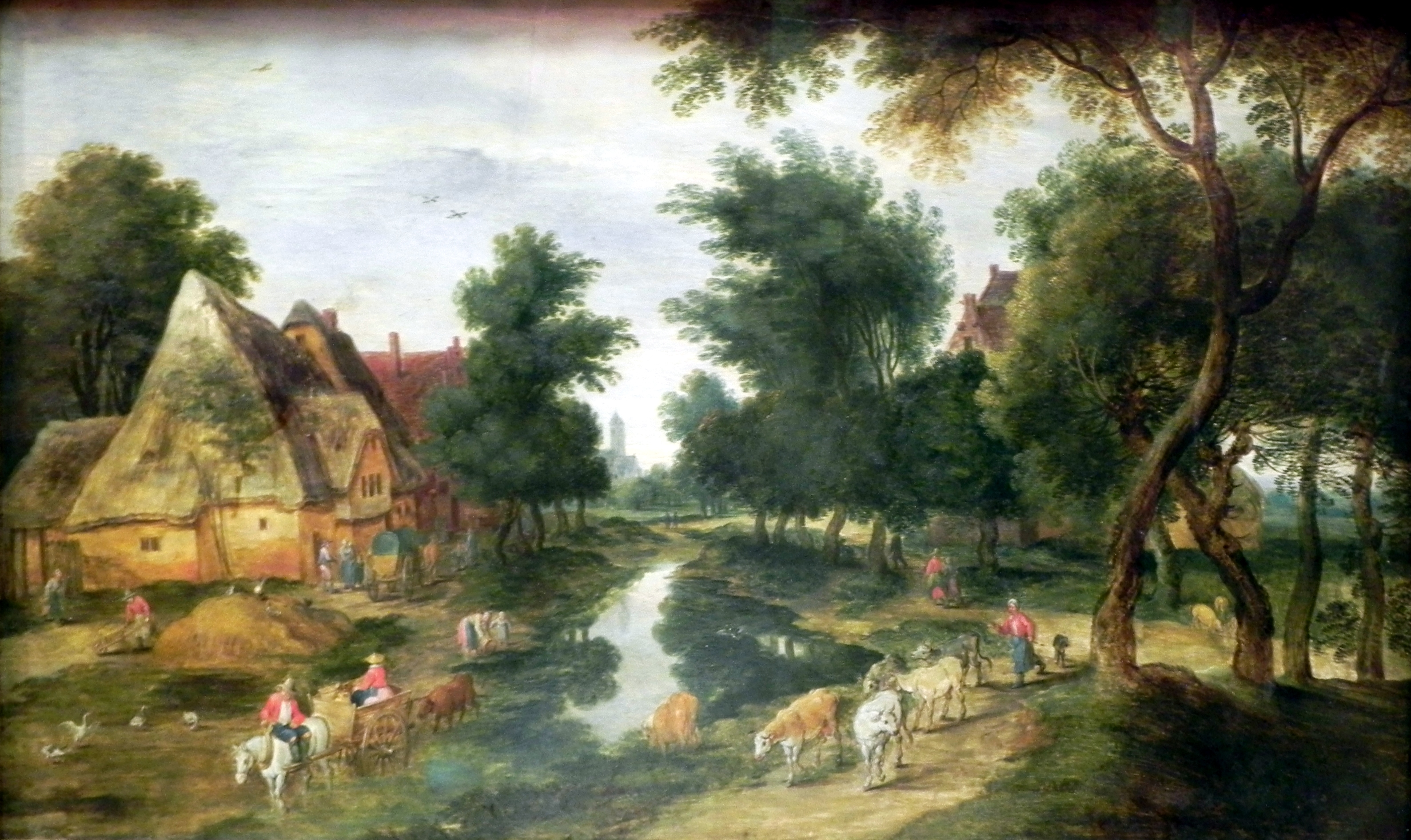 Dorfstraße mit Teich (Sommer)